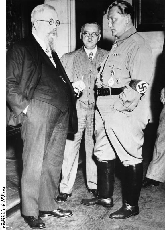 Hermann Göring als Reichstagspräsident